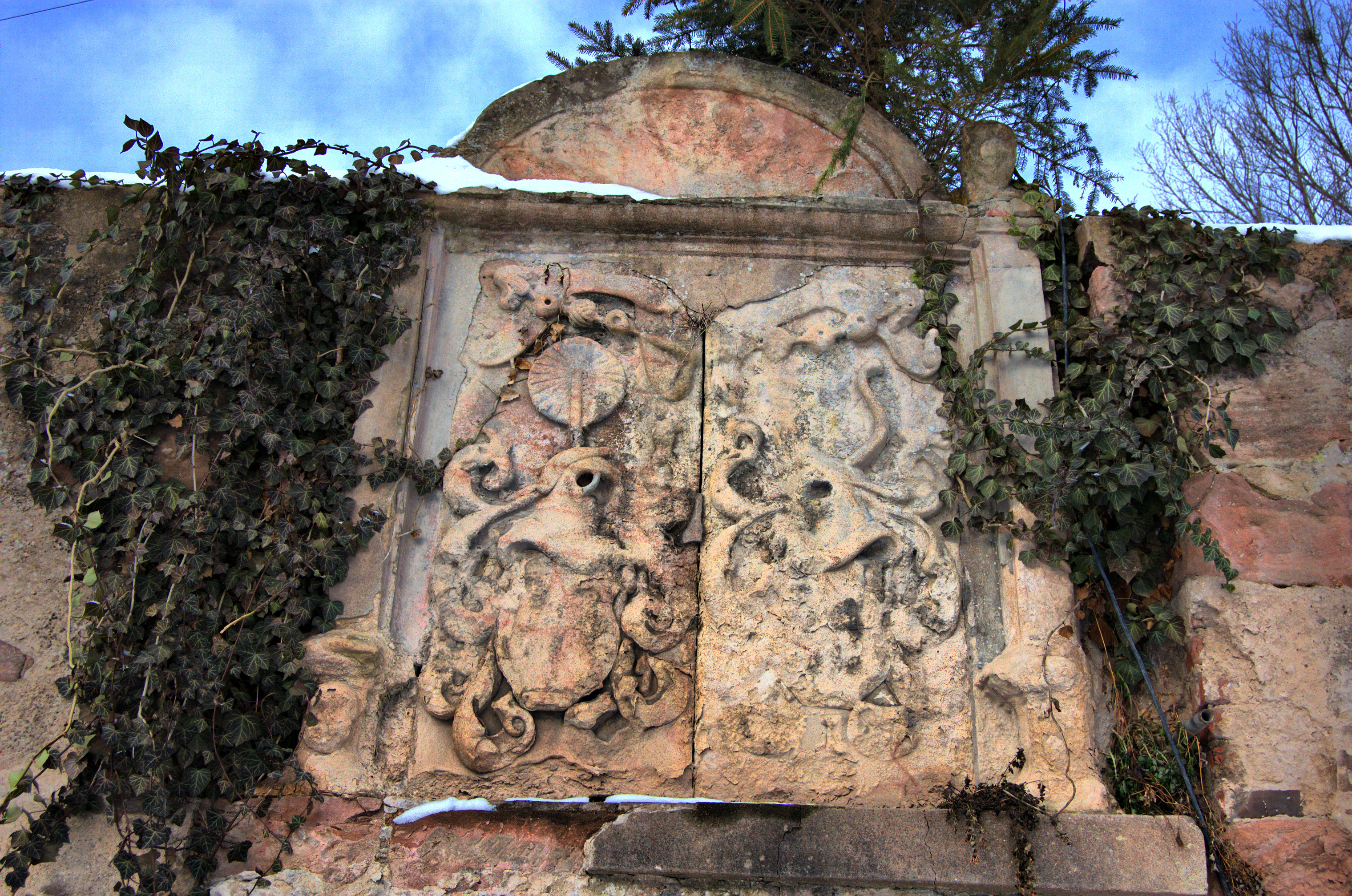 Auer Wasserburg bei Wanfried